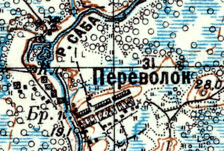 Топографическая карта Ленинградской области, квадрат VIc-27 (Залустижье), деревня Переволок